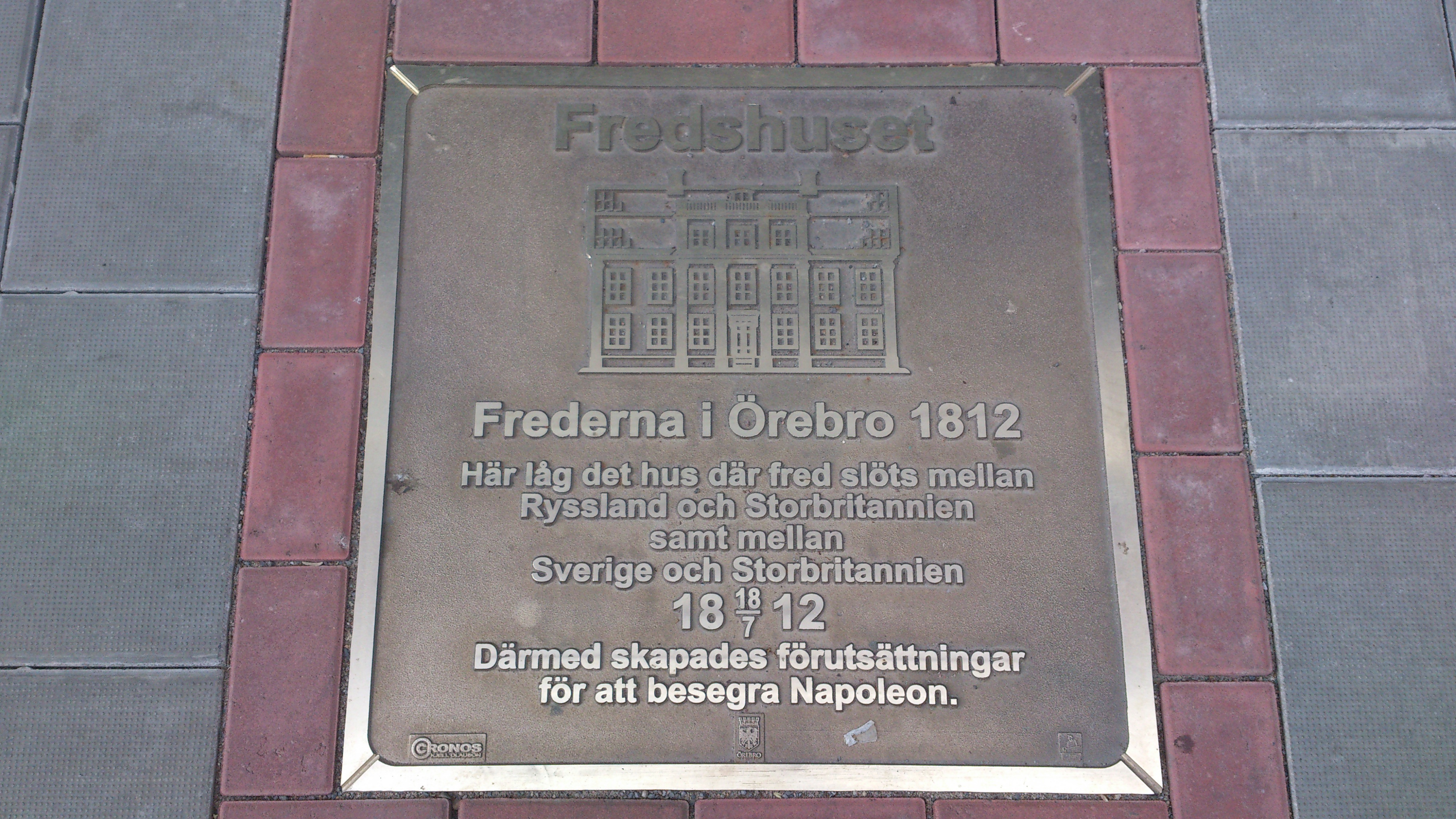 Minnesplatta över freden i Örebro 1812. Minnesplattan avtäcktes av landshövding Rose-Marie Frebran den 18 juli 2012, genom en ceremoni till minnet av fredsundertecknandet den 18 juli 1812.